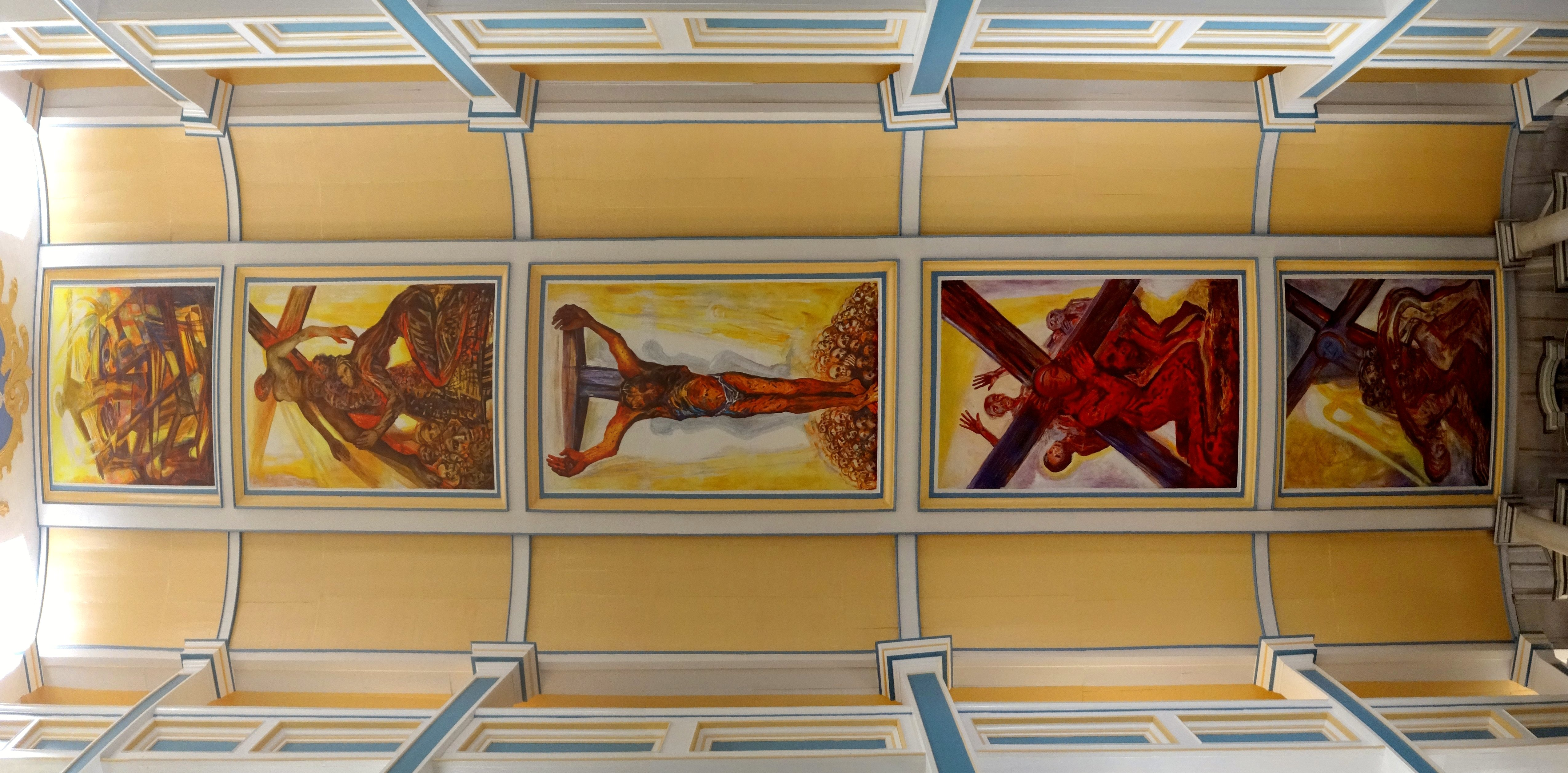 St. Crucis Wölfis, Deckengemälde von Gert Weber, der Kreuzweg Jesu von 2008. Vom Orgelbereich bis zur Kanzel stellen sie die Szenen der Verspottung Jesu, den Zusammenbruch beim Tragen des Kreuzes, die Kreuzigungsszene an sich, die Grablegung und schließlich die Auferstehung dar.